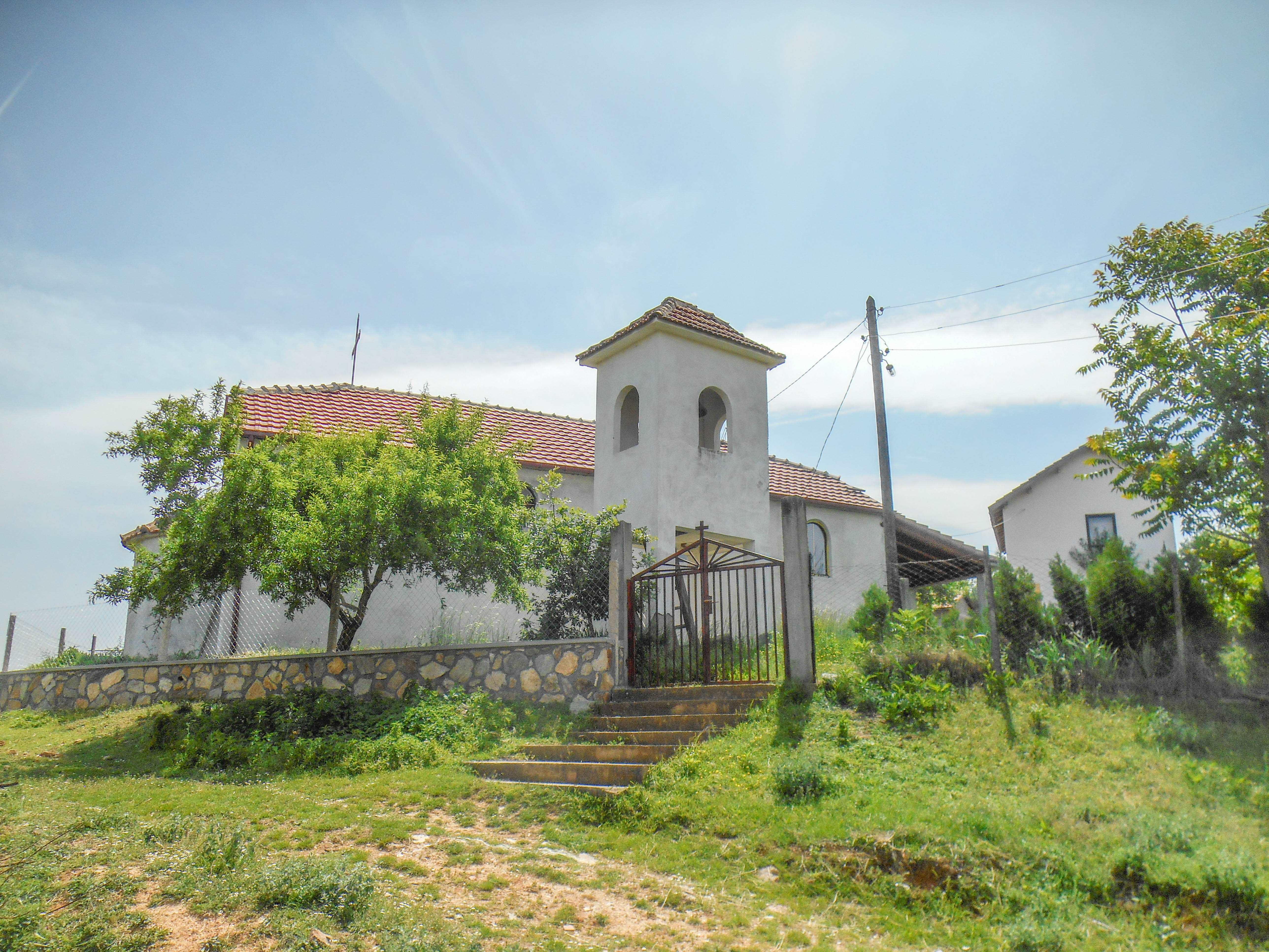 Црква „Св. Ѓорѓи“ - Радичево